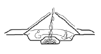 Skisse av groptuft fra steinalderen